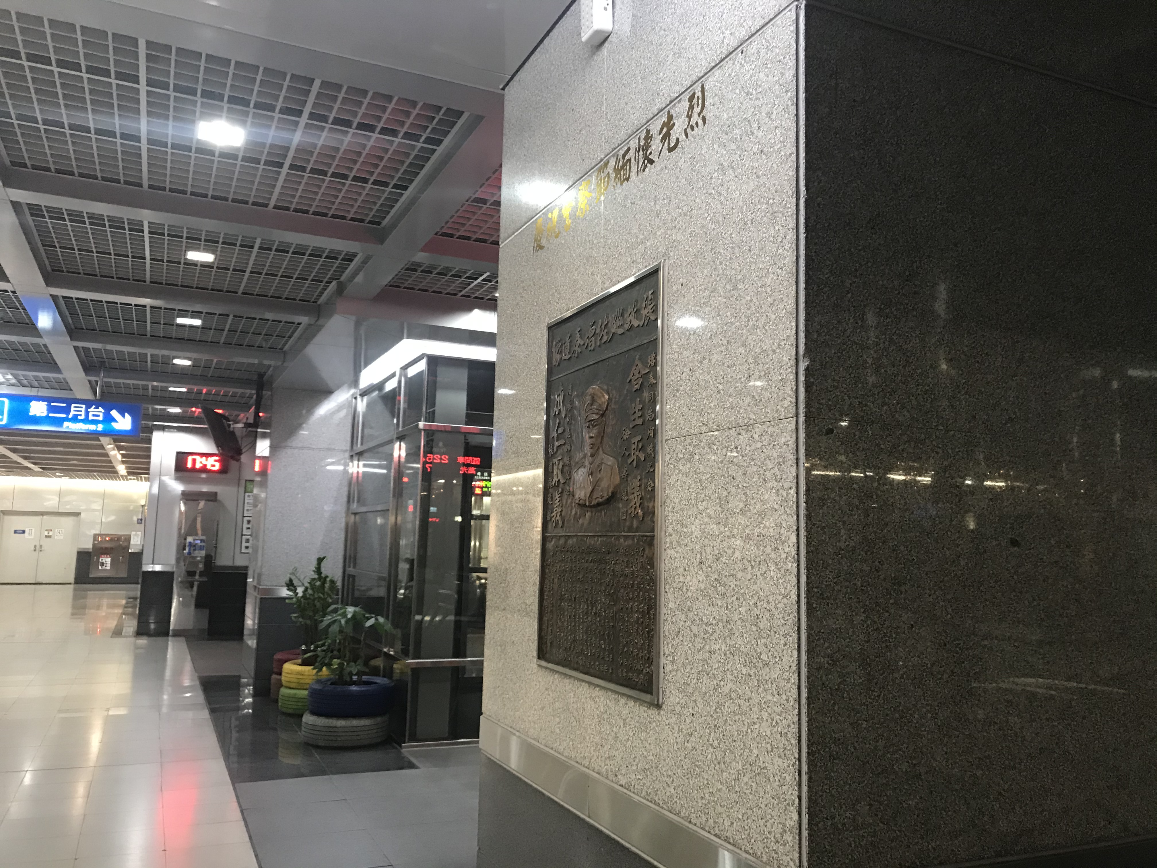 臺灣鐵路管理局南港車站第二月台入口旁的張增泰殉職紀念牌。